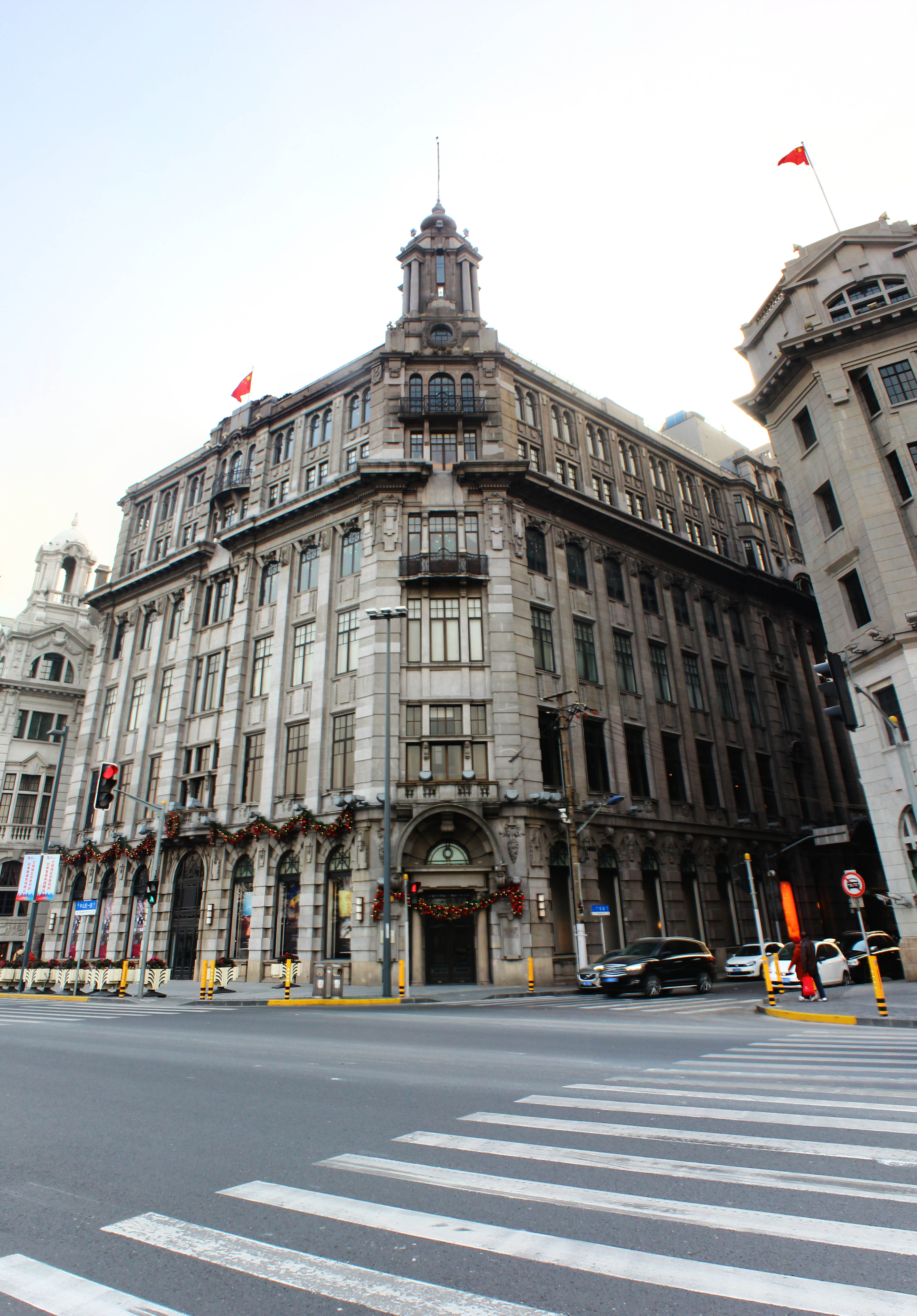 中文（中国大陆）: 有利大楼东北立面